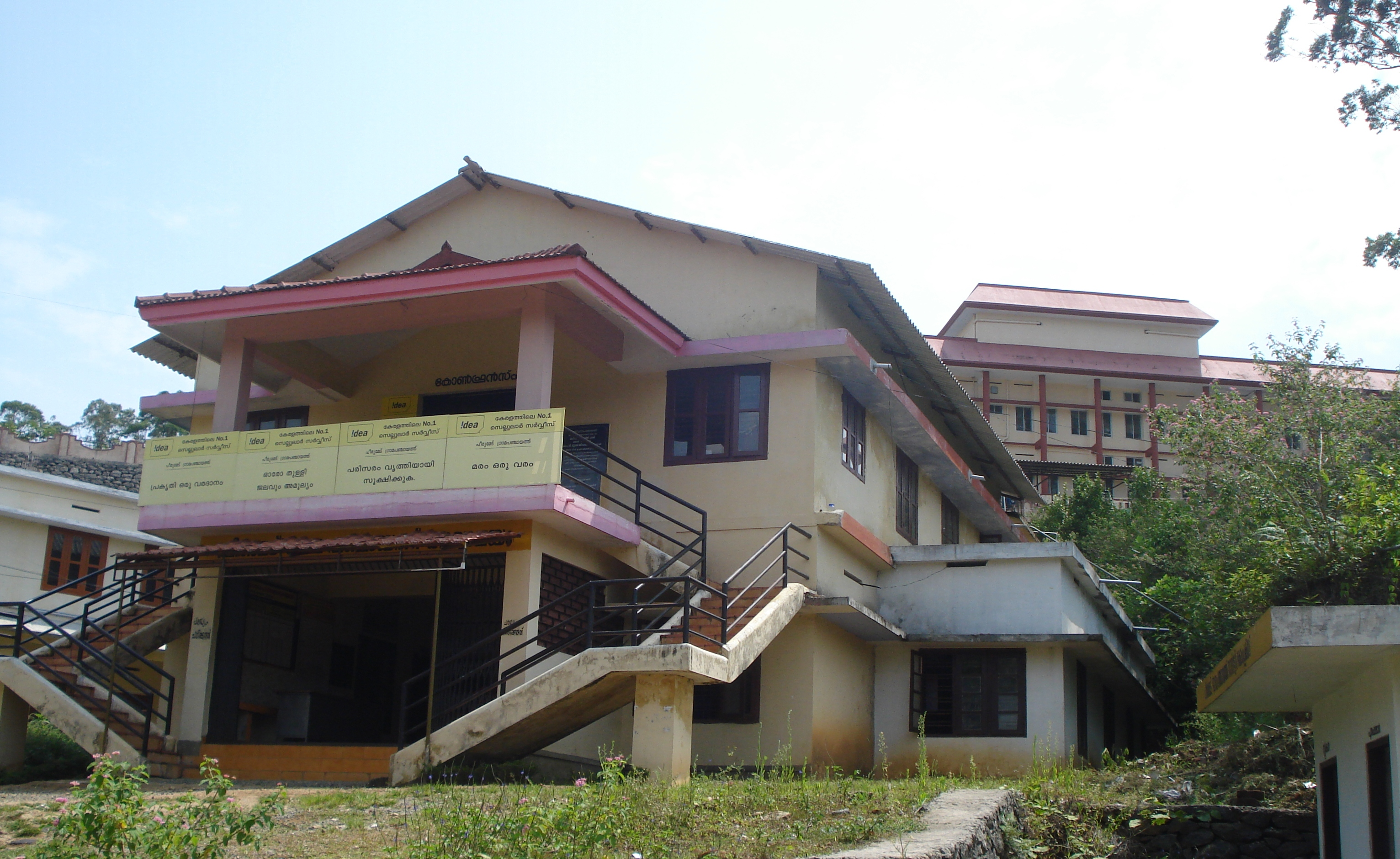 പീരുമേട് പഞ്ചായത്ത് ഓഫീസ് കെട്ടിടം- പീരുമേട്